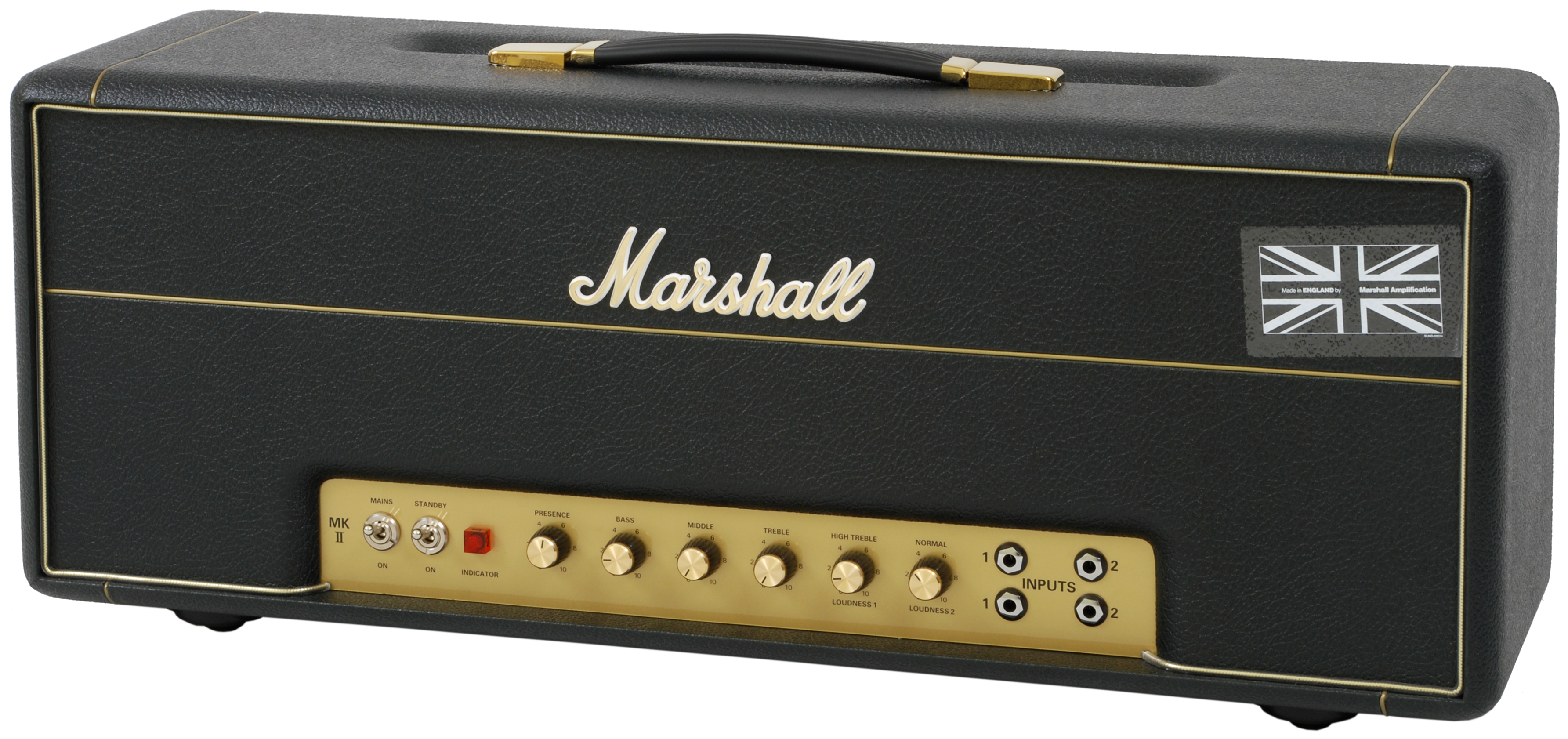 Wzmacniacz gitarowy (head) 1959SLP-01 firmy Marshall